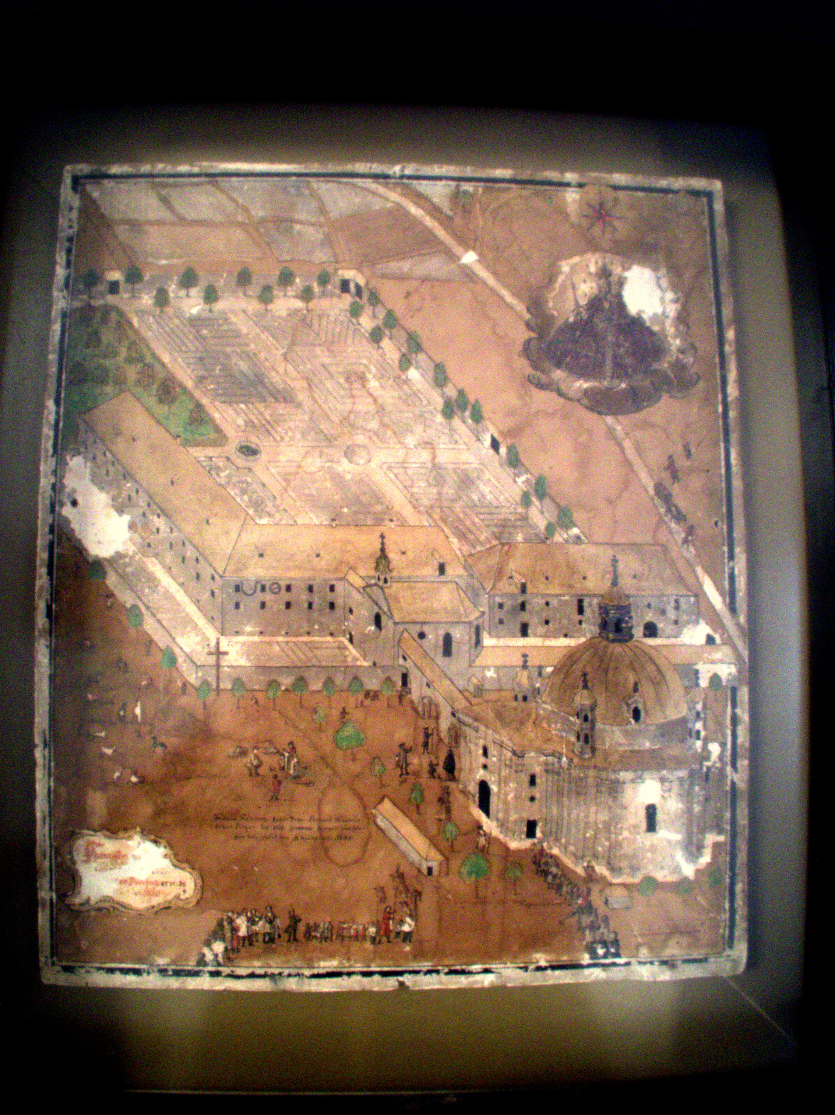 Das Franziskanerkloster im Oberpfälzischen Freystadt